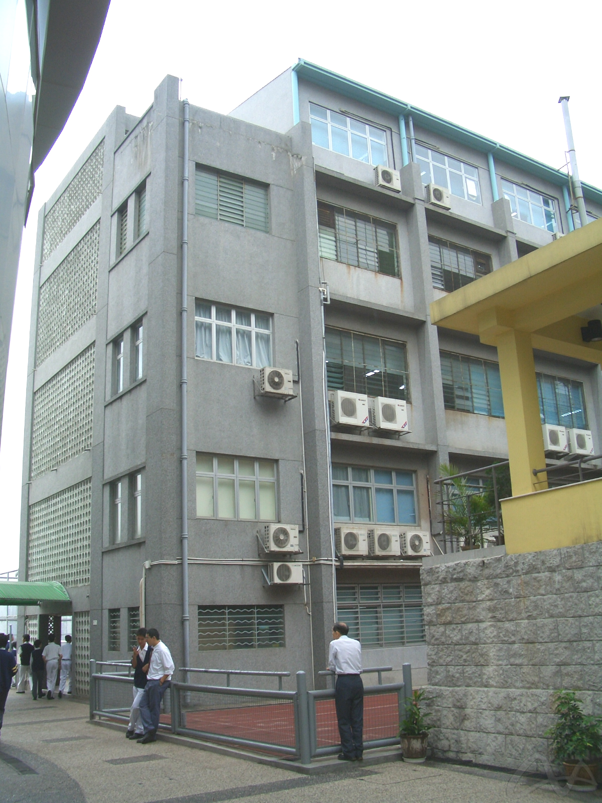 粵華中學鳴道樓。